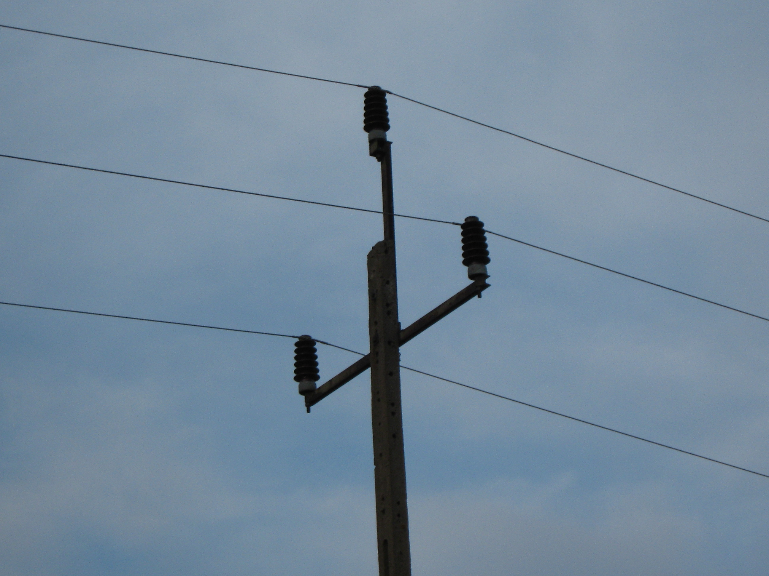 Słup średniego napięcia w układzie przewodów trójkątnym.